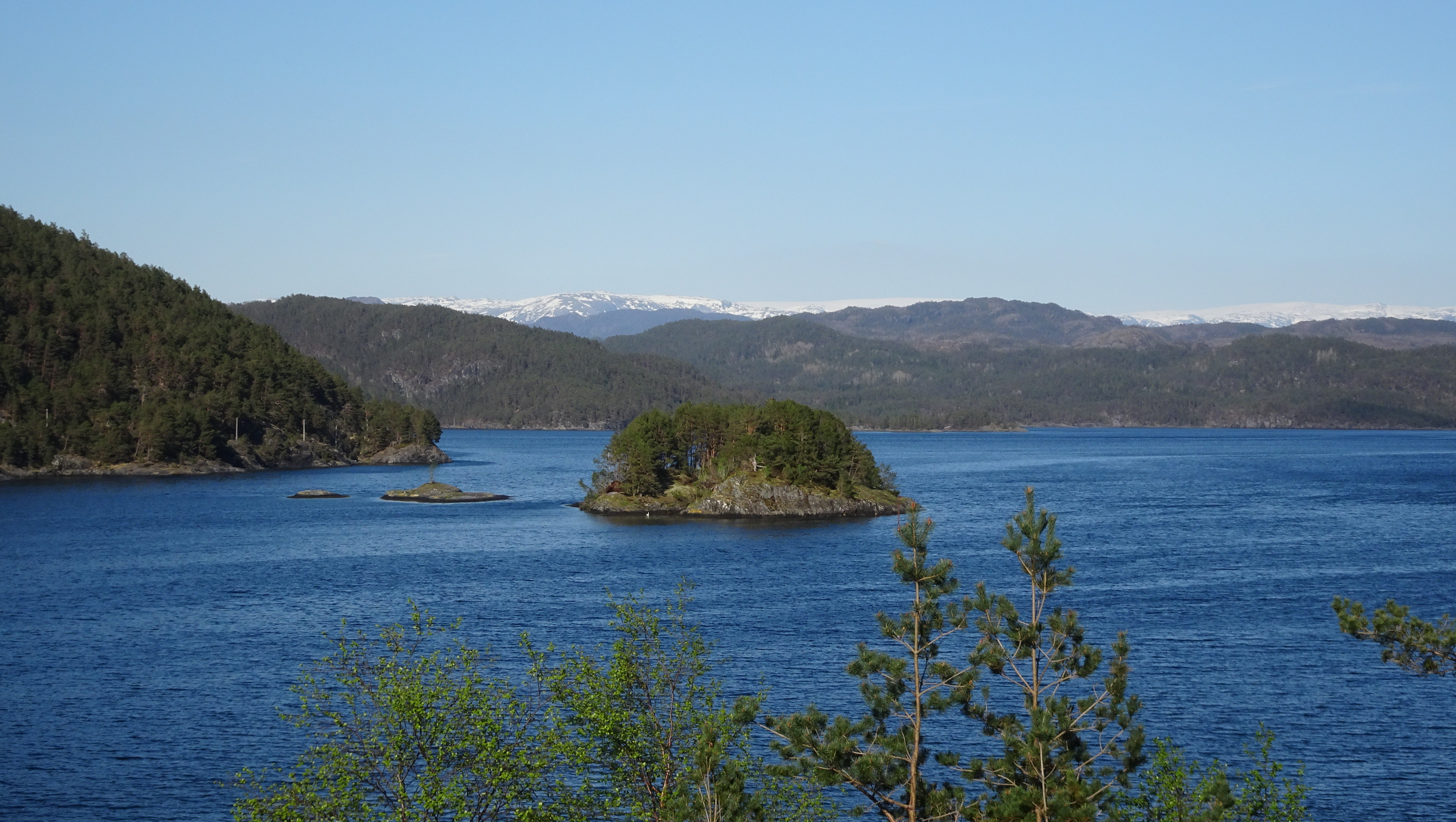 Lygrespollen med Laukholmen i forgrunnen